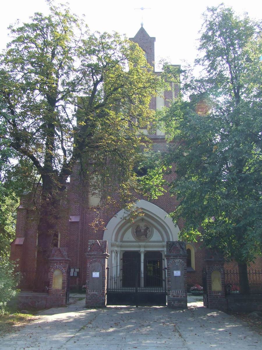 Starawieś koło Węgrowa w gminie Liw, kościół pw. św. Michała Archanioła 1866-71